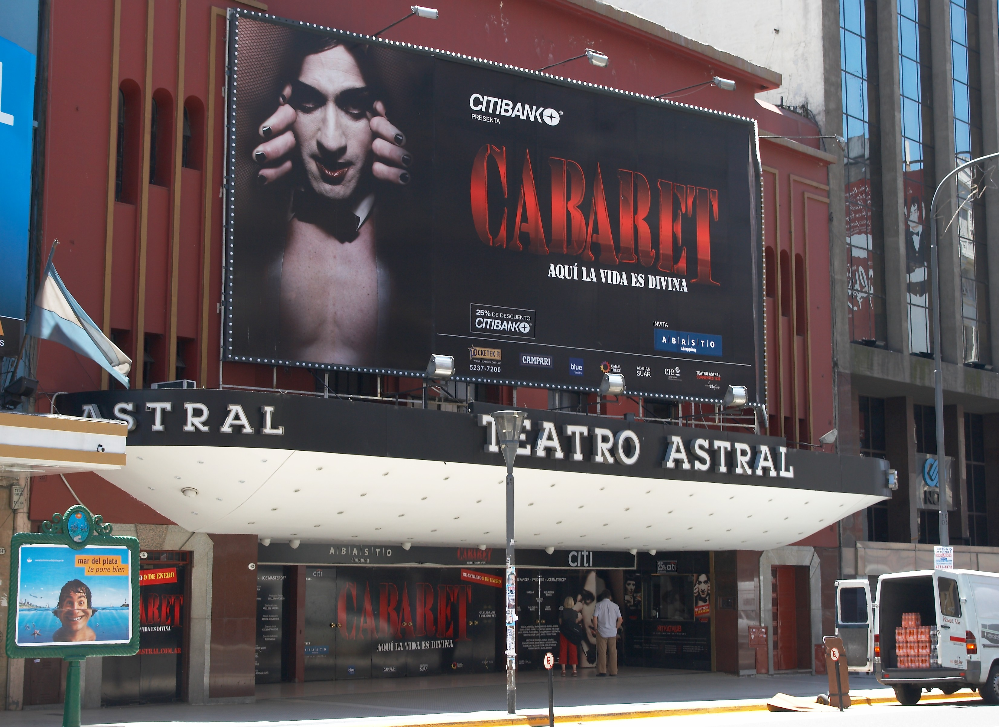 Teatro Astral, Avenida Corrientes, barrio de San Nicolás, Buenos Aires, Argentina.